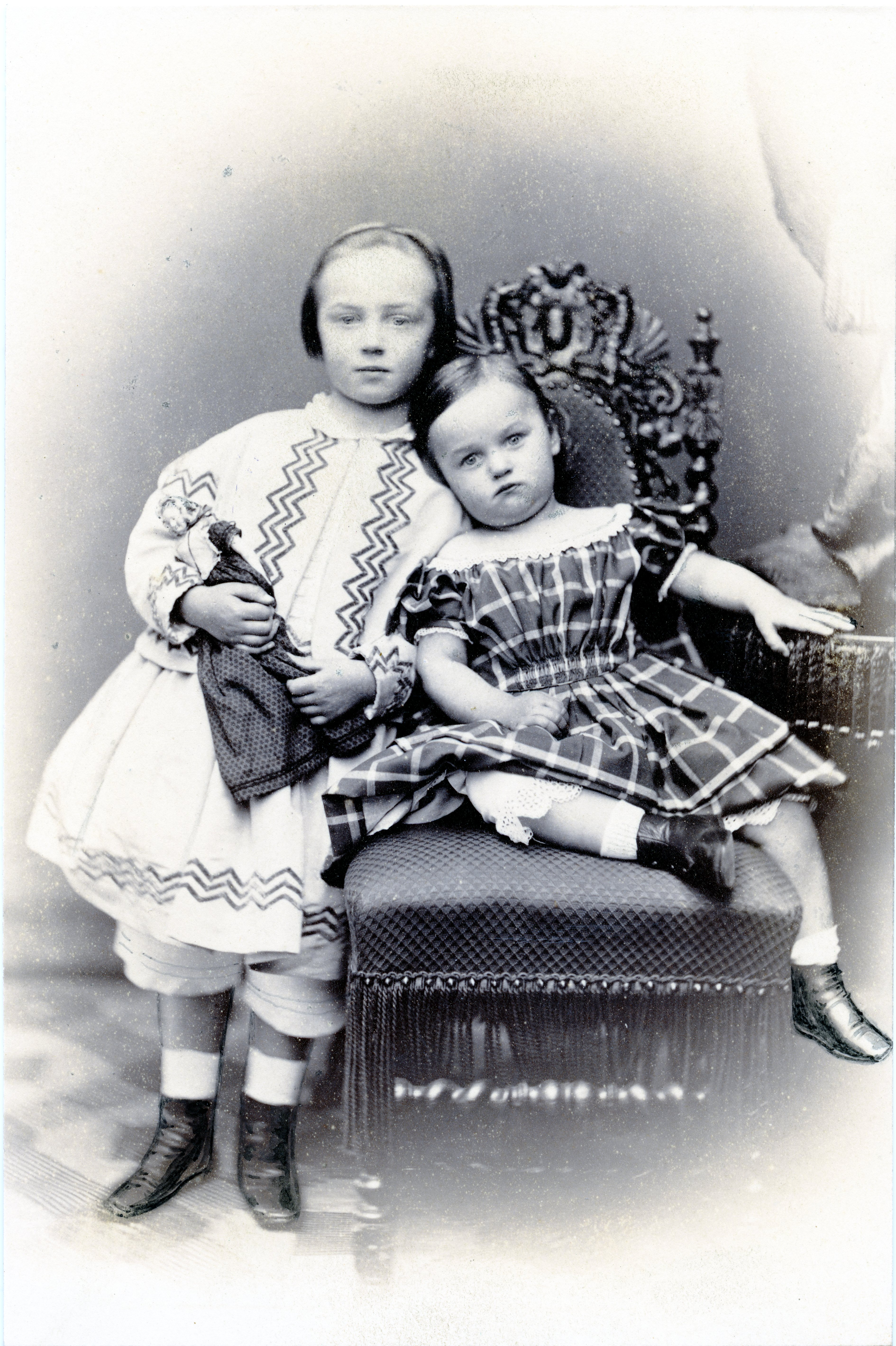 Julia Elizabeth Merck (* 9. April 1860 in Hamburg; † 4. Juni 1942 ebenda) [1] Olga Louise Merck (* 29. August 1863 in Hamburg; † 4. Mai 1963 ebenda)[2]